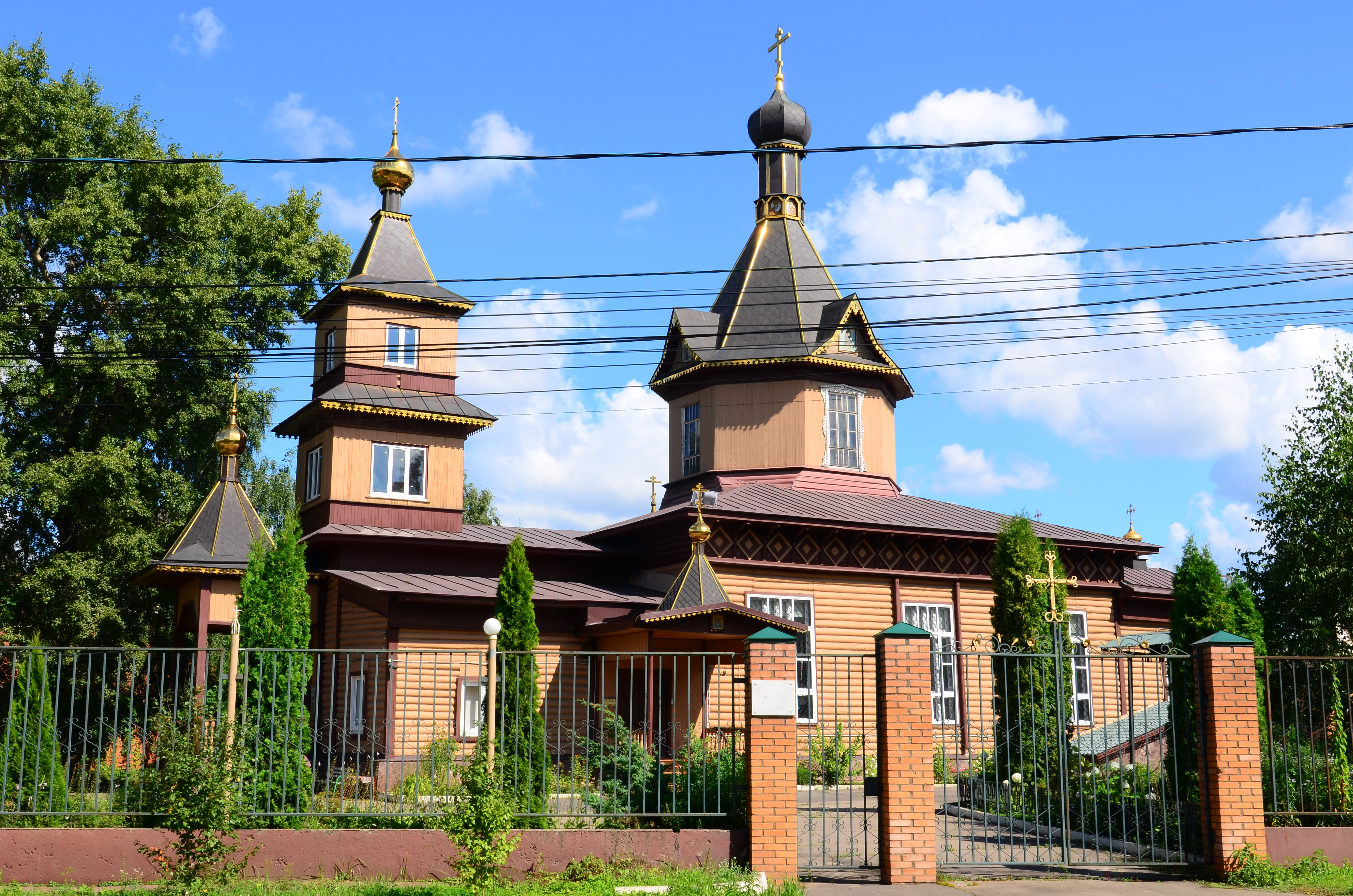 Церковь Петра и Павла: улица Советская, 21, Малаховка, Люберецкий район, Московская область